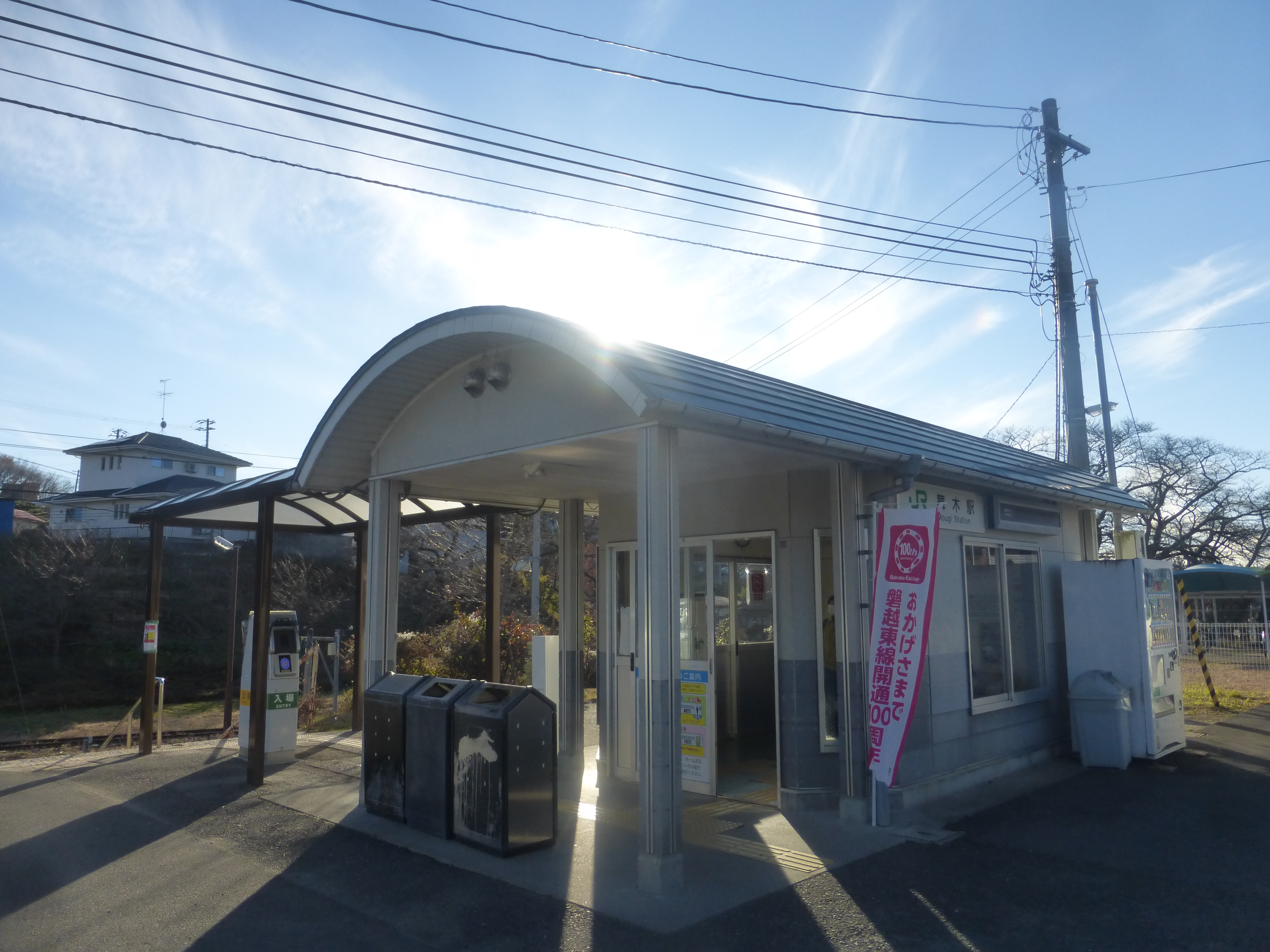 Mōgi Station (舞木駅)